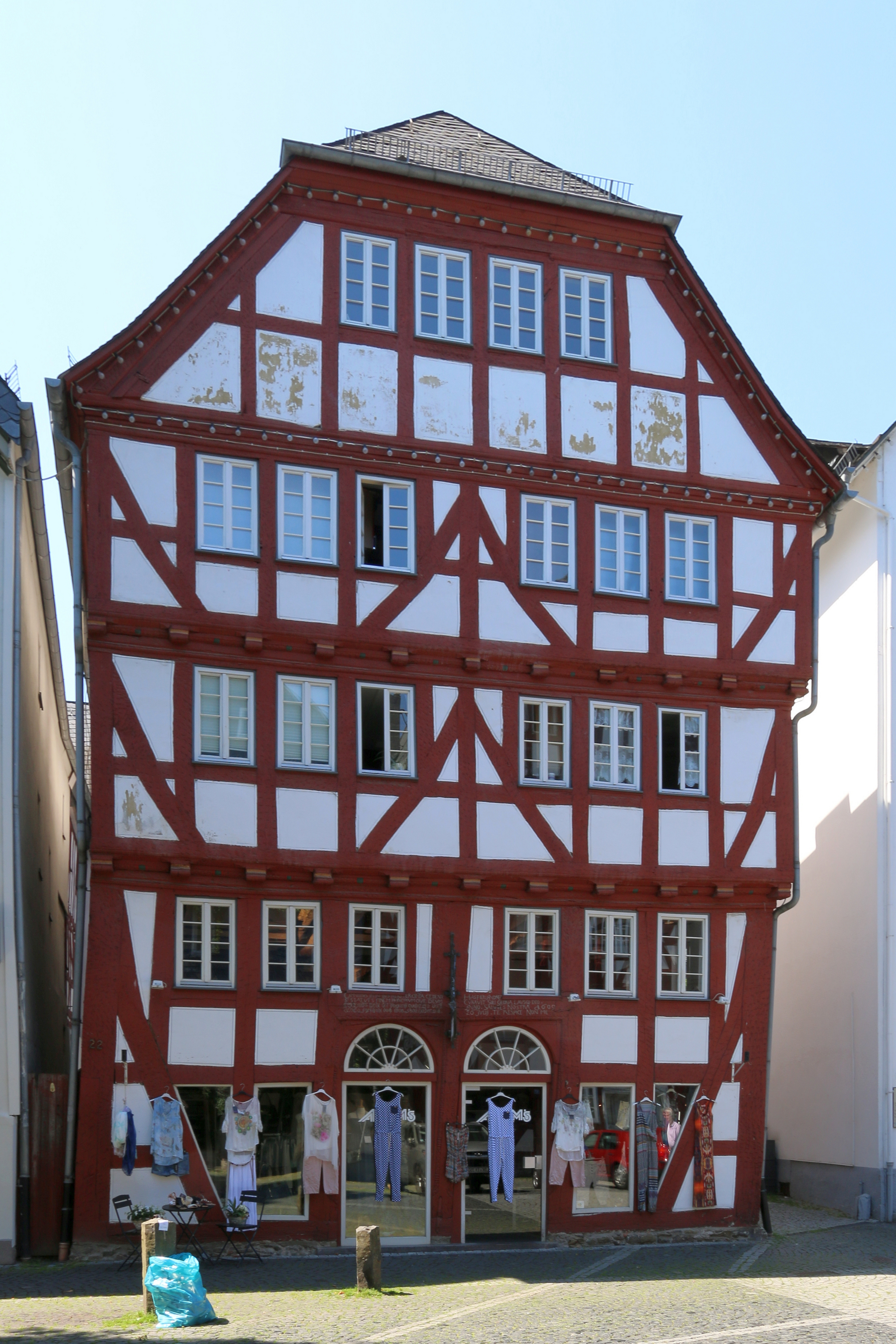 Herborn, Lahn-Dill-Kreis: Fachwerkhaus Kornmarkt 22